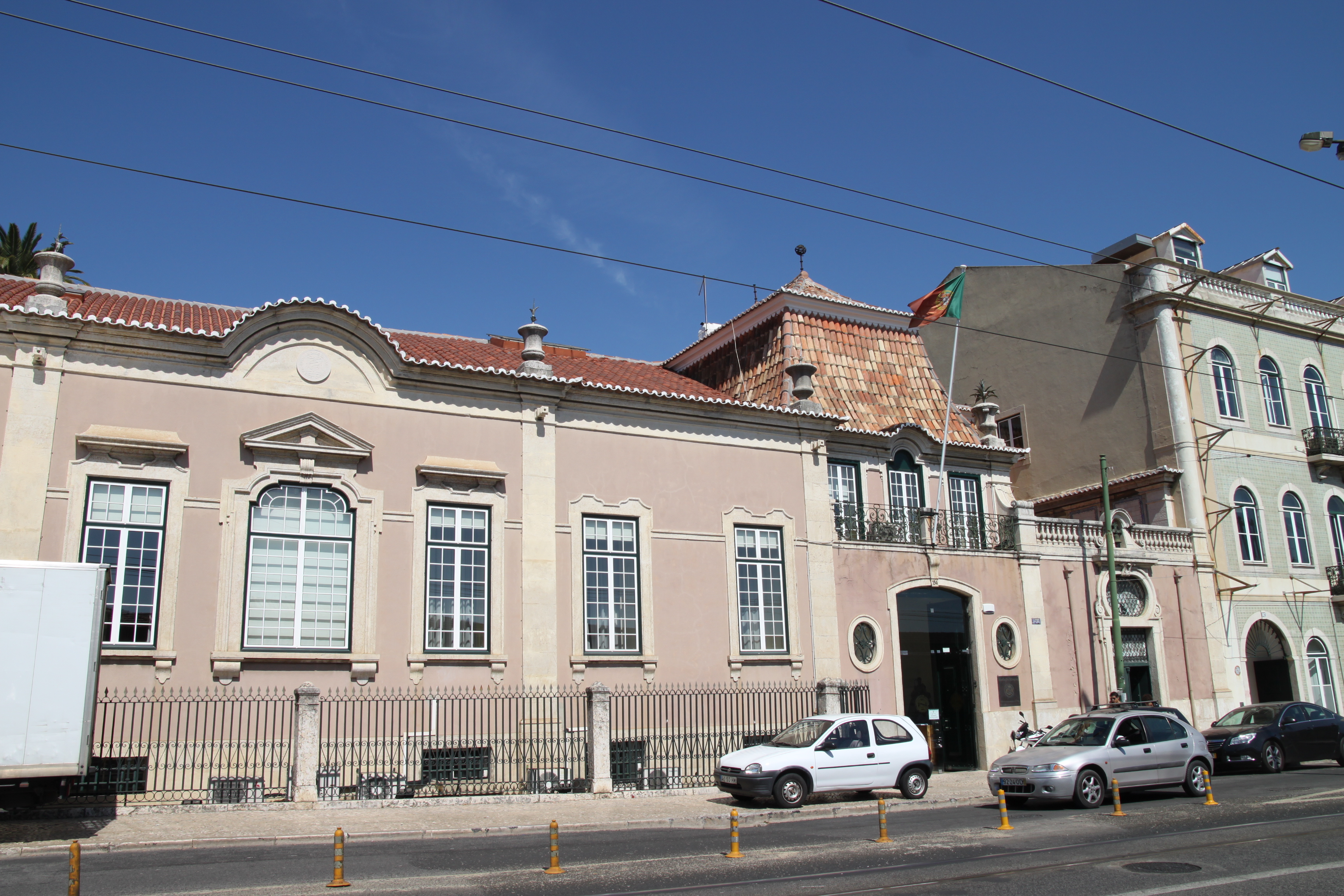 Casa Nobre de Lázaro Leitão Aranha This file was uploaded for Wiki Loves Monuments in Portugal with the unique identifier 74579.